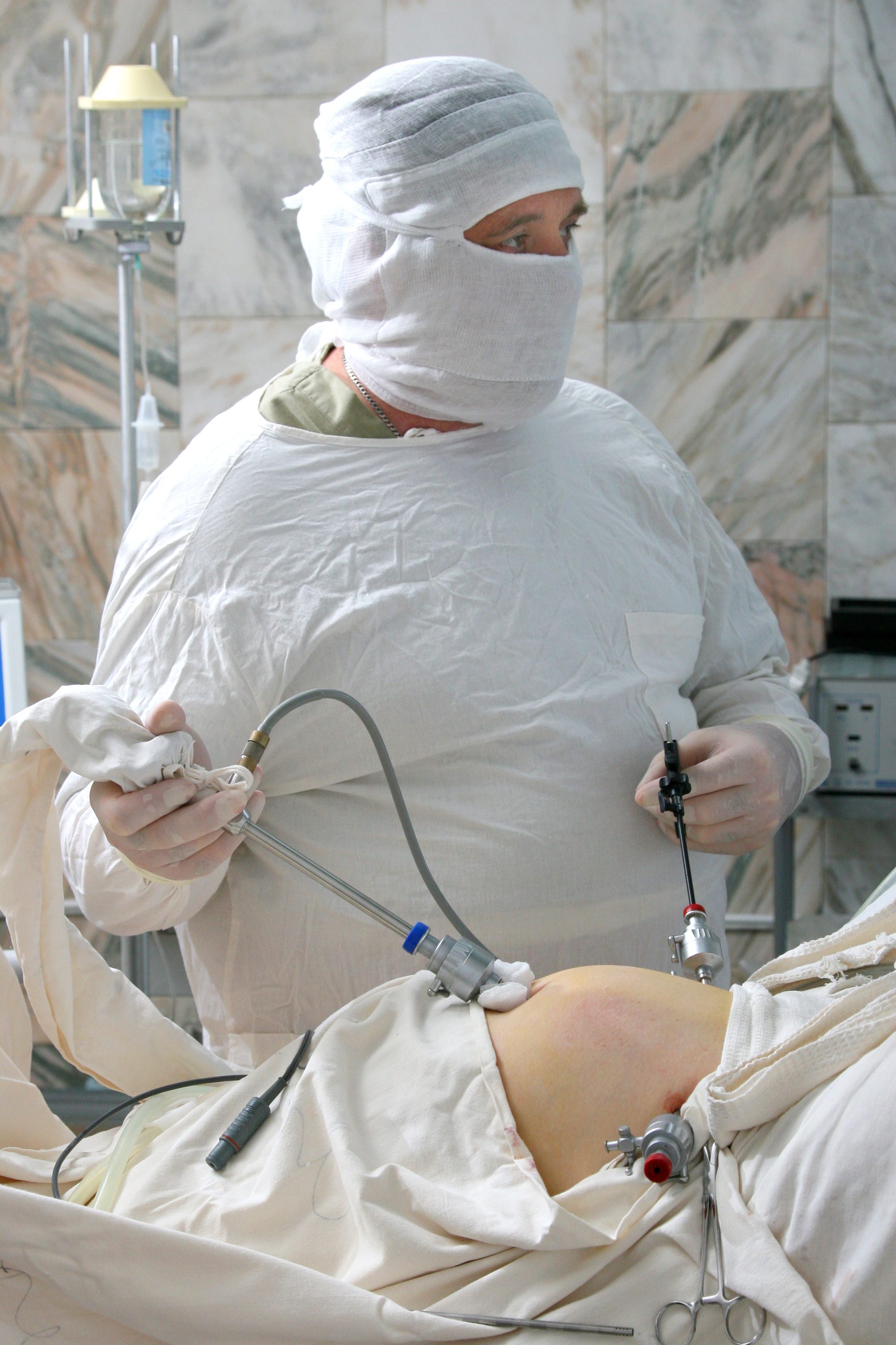 Ропотан А Г перед лапароскопічною операцією